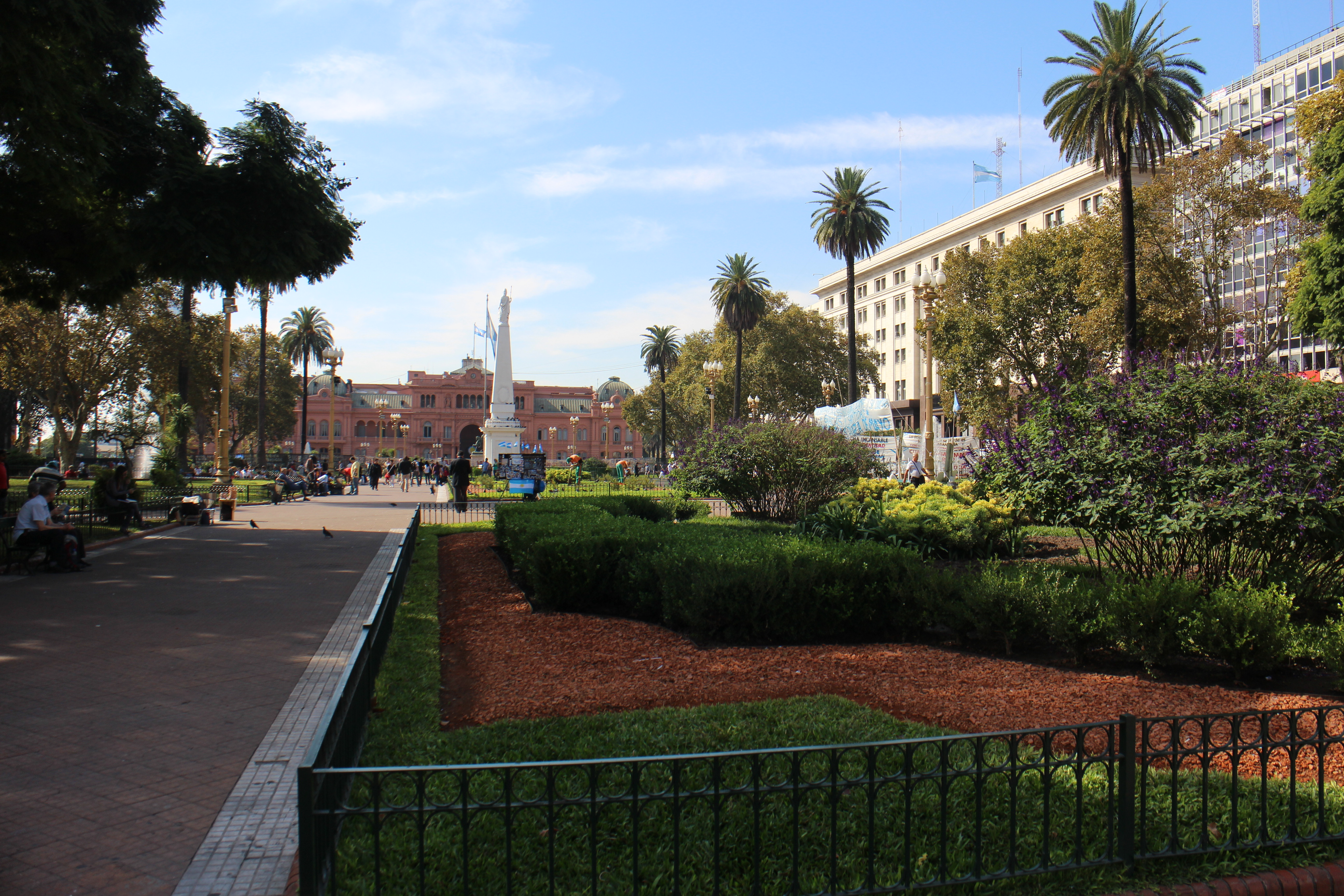 Plaza de Mayo, Ciudad Autónoma de Buenos Aires.